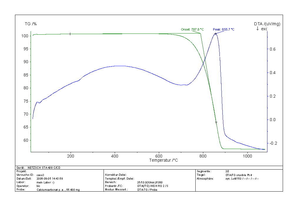 DTA-Aufnahme CaCO3-Entsäuerung